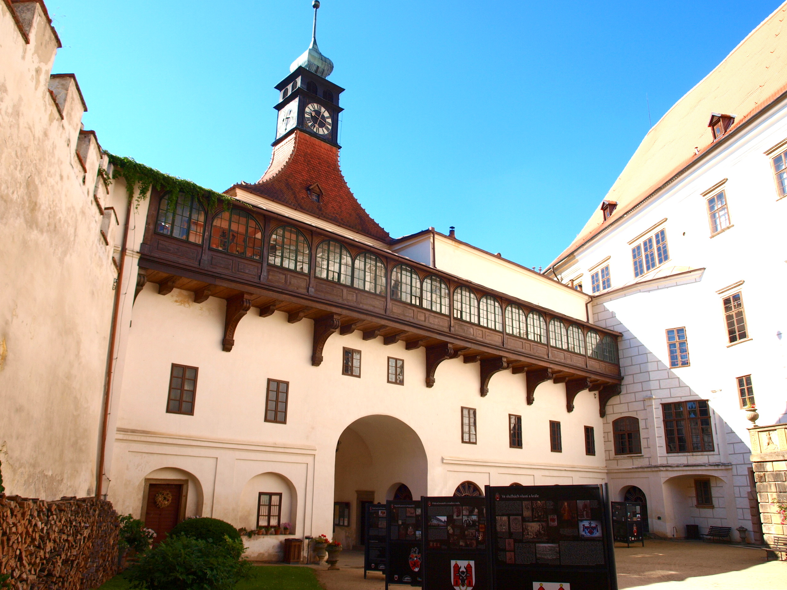 zámek Náměšť nad Oslavou